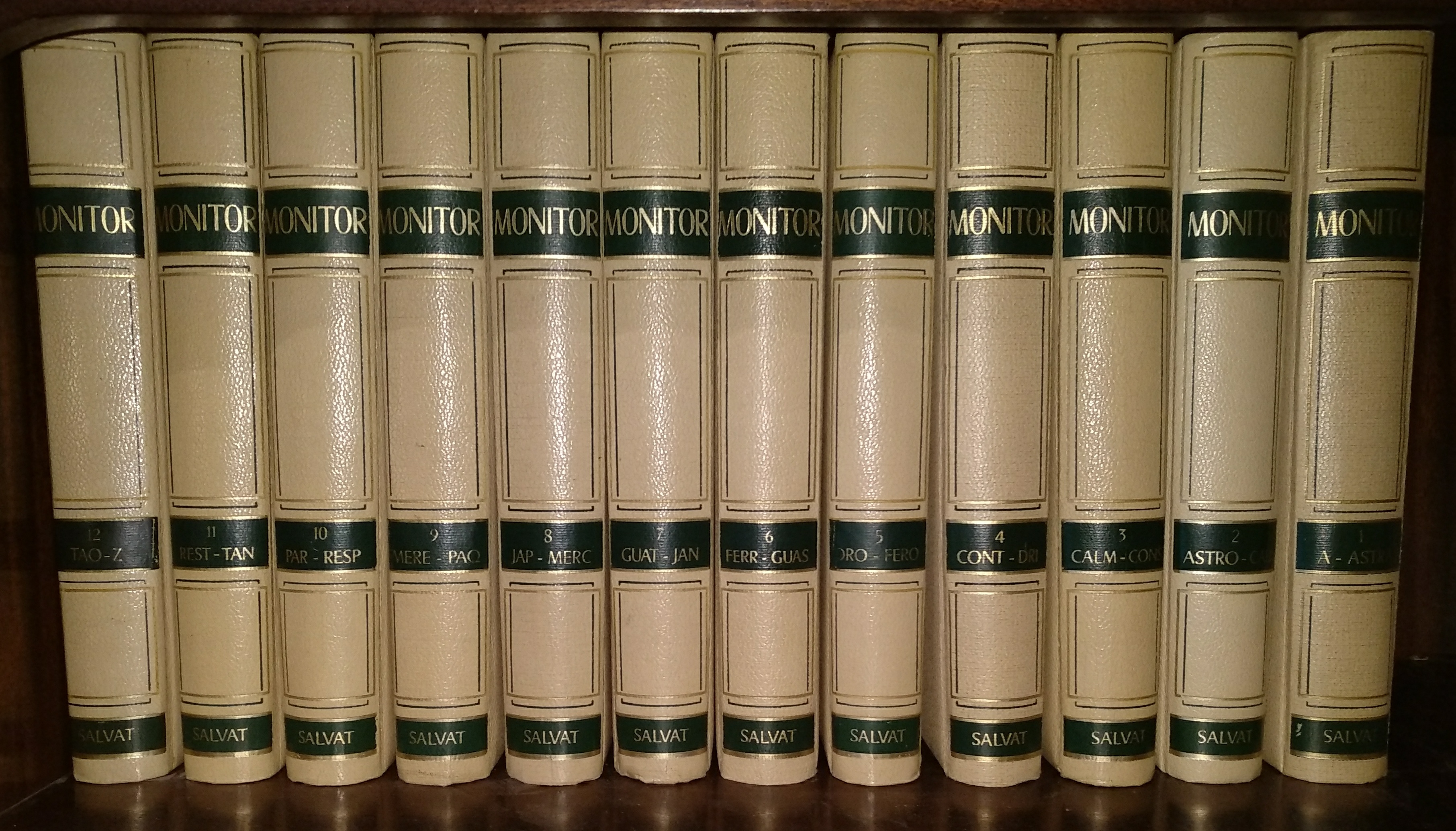 Conjunto de volúmenes puestos en la estantería